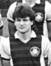 Title: Mannschaftsfoto 1. FC Lok Leipzig Factual corrections and alternative descriptions are encouraged separately from the original description. Additionally errors can be reported at this page to inform the Bundesarchiv. Original historic description: ADN-ZB-Kluge-21.11.88-ma-Leipzig: Fußball-Oberliga-Saison 1988-89. Die Mannschaft des 1. FC Lok Leipzig: Hintere Reihe v.l.n.r.: Heiko Scholz, Hans-Järg Leitzke, Matthias Lindner, Torsten Kracht und Andre Barylla. Mitte v.l.n.r.: Hans Ullrich Thomale (verantw. Trainer), Wolfgang Fichtner (Mannschaftsleiter), Matthias Liebers, Uwe Zötzsche, Olaf Marschall, Matthias Zimmerling, Bernd Hobsch, Frank Edmond, Dorit Kamprad (Physiotherapeutin) und Gunter Böhme (Assistenztrainer). Vorn v.l.n.r. Ronald Kreer, Uwe Bredow, Rene Müller, Joachim Niklasch, Dieter Kühn und Frank Baum.